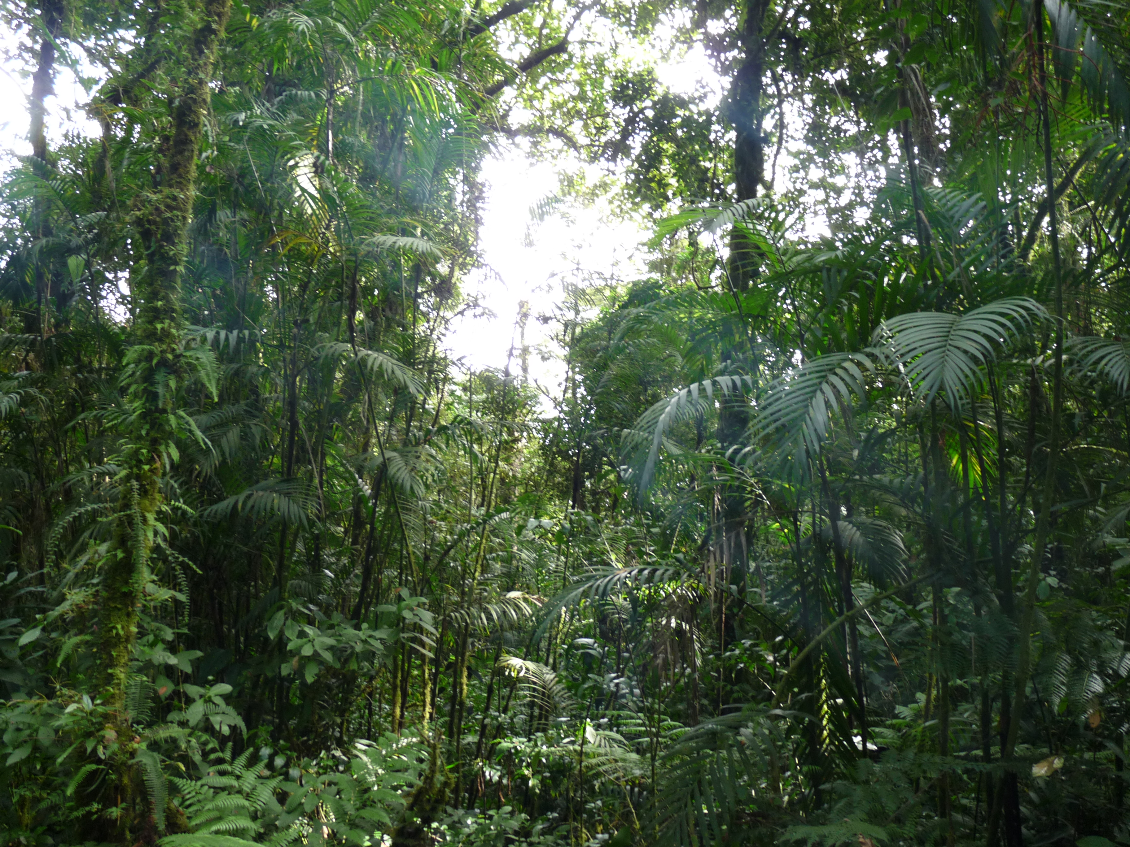 Fotos en el sector norte del Parque Nacional Volcán Barú, área núcleo de la Reserva de la Biosfera La Amistad Panamá.